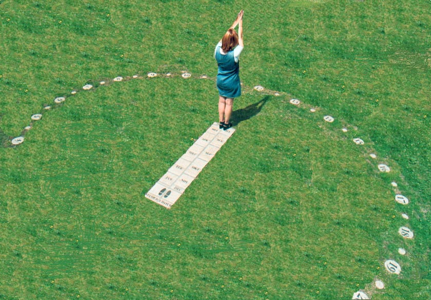 Analemmatische zonnewijzer, door mij ontworpen, eigen foto. Deze zonnewijzer bevindt zich in de tuin van het Stedelijk Museum aan de Guido Gezellestraat in Hasselt (België).